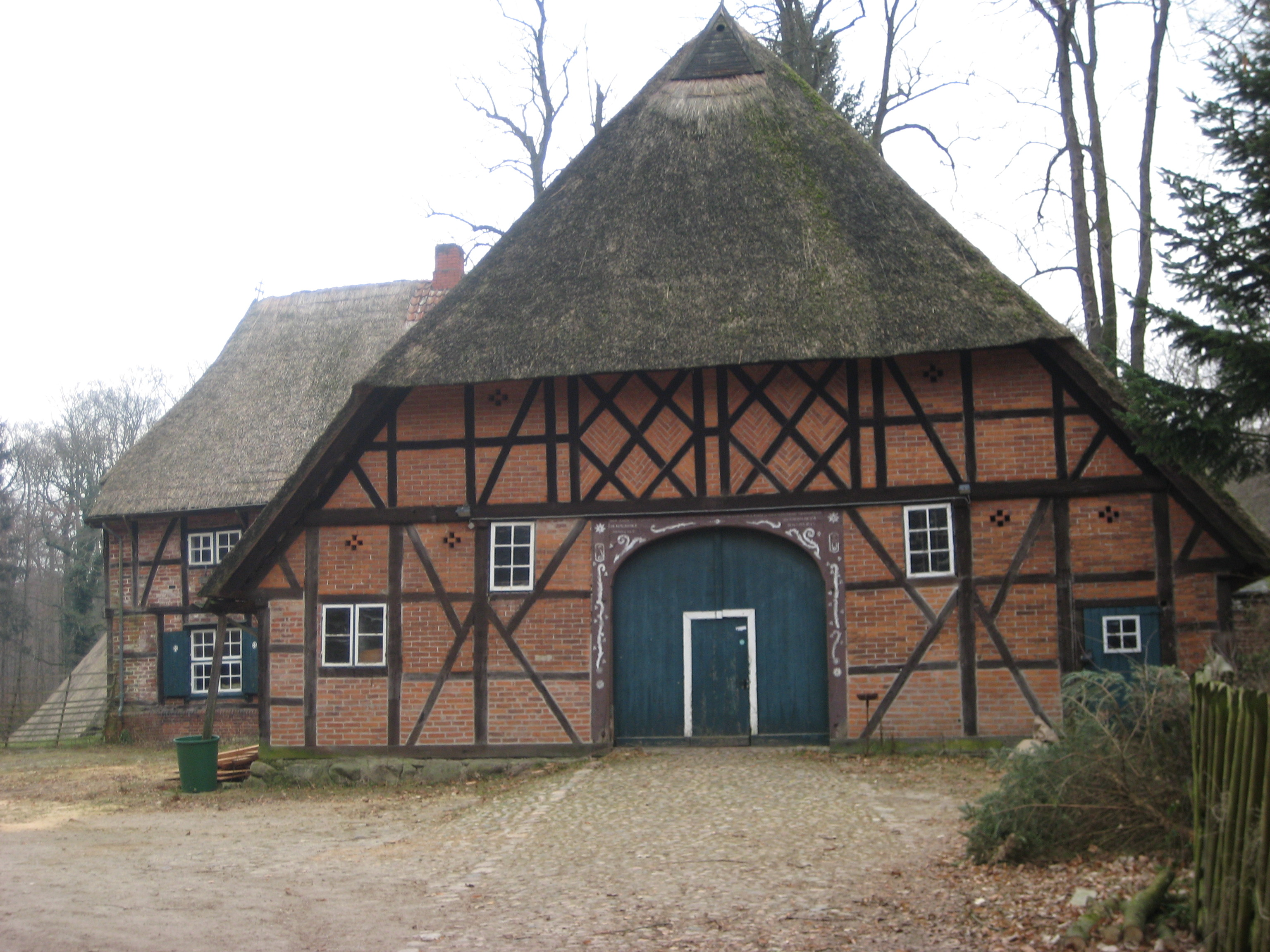 Forsthaus Waldhusen Forsthaus Waldhusen ist der 1765 gebaute Amts- und Wohnsitz des Försters des Forstes Waldhusen in Lübeck